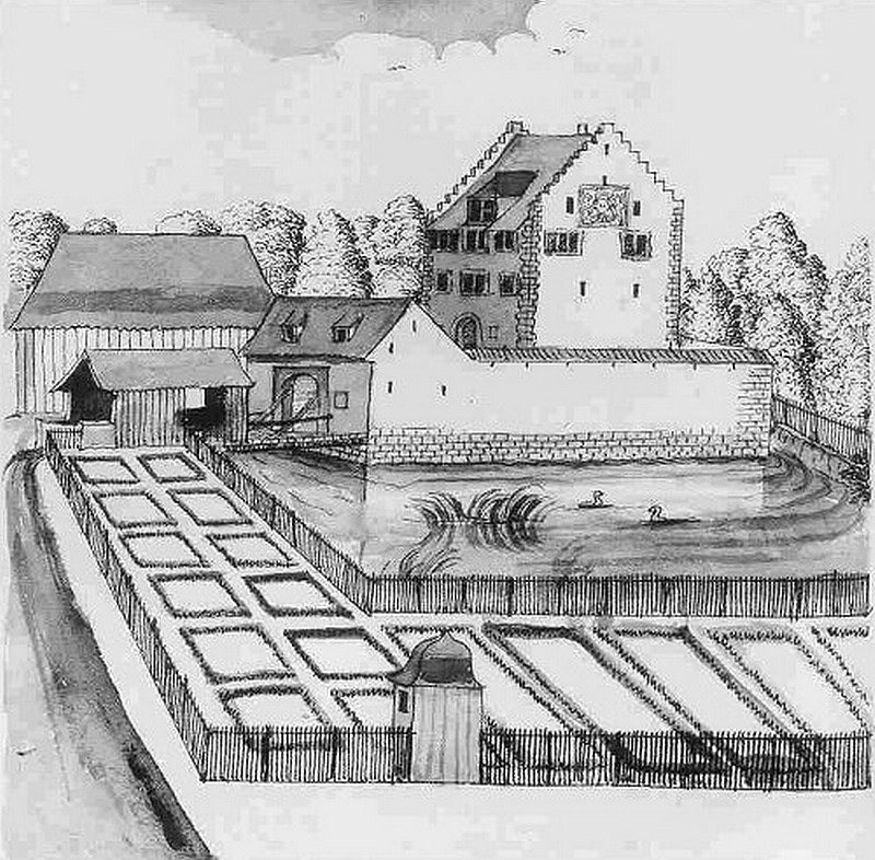 Schloss Knonau : Darstellung des Schlosses im Regimentsbuch des Junkers Gerold Escher.